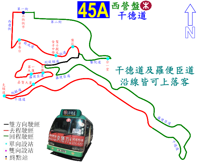 中文（香港）: 港島專線小巴45A線的走線圖